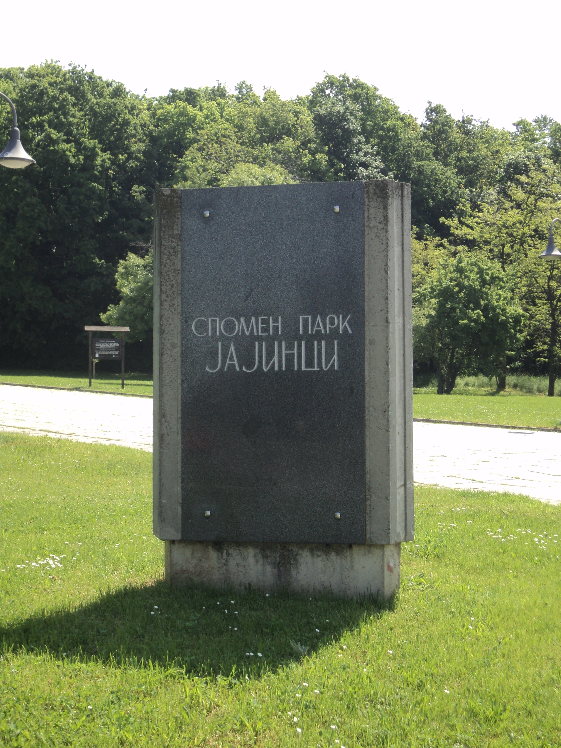 Ploča spomen-kompleksa Jajinci